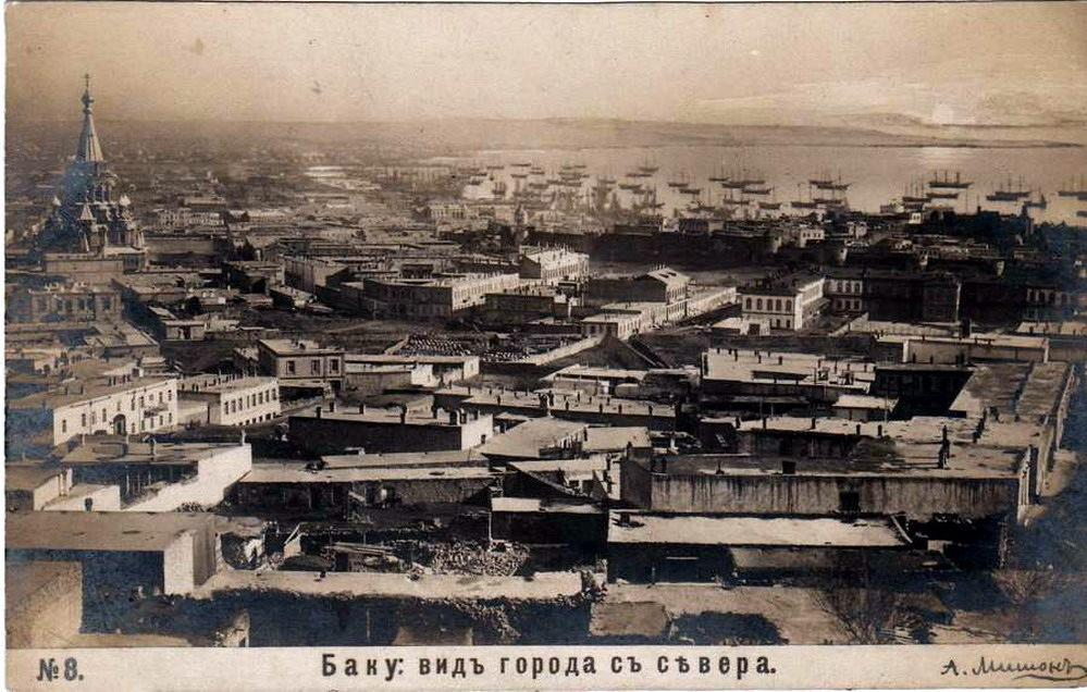 Баку. Вид с севера.Фото-А. Мишон 1898